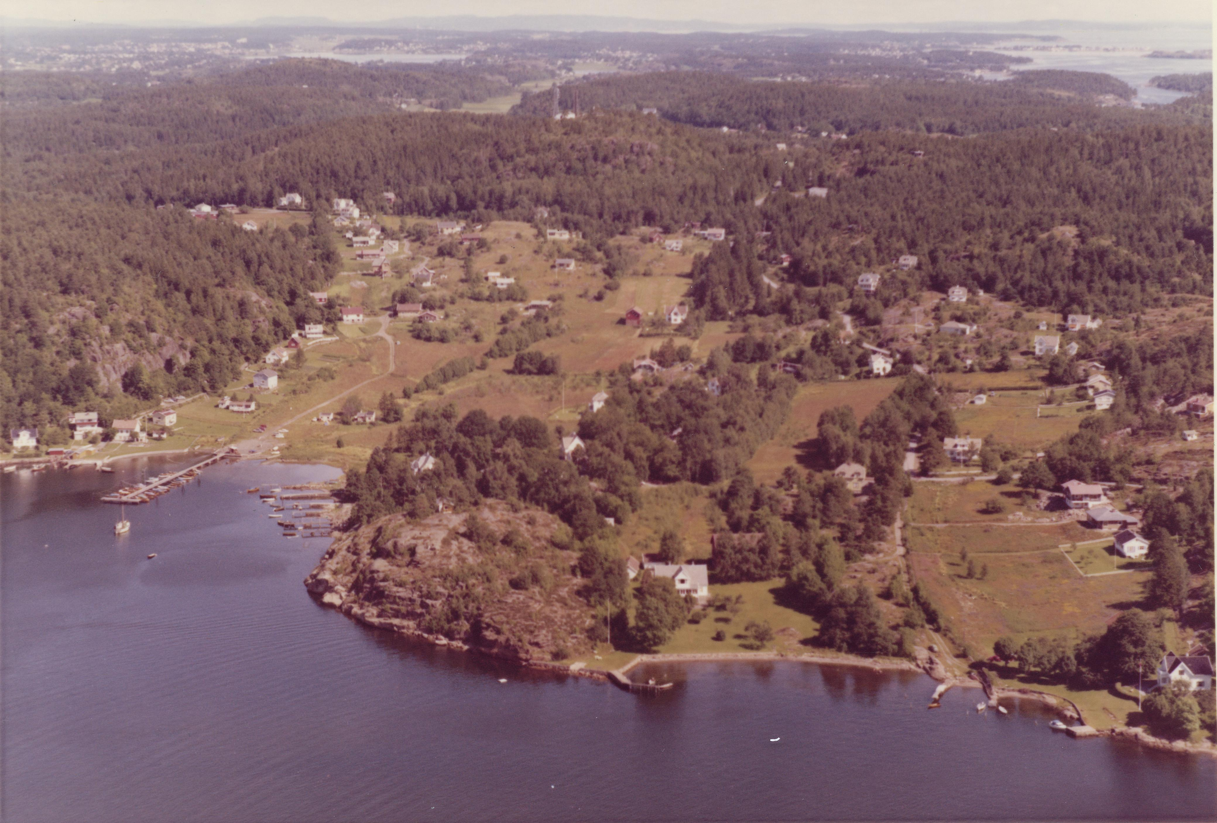 WF.S.185227